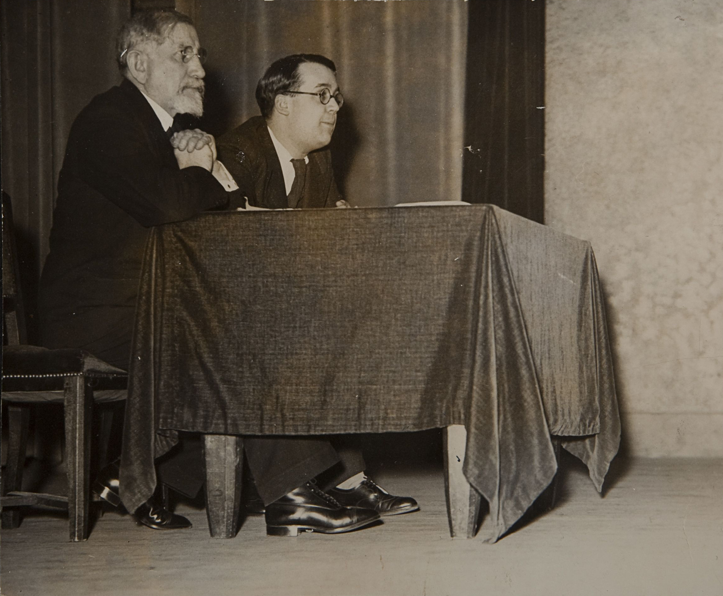 Robert Brasillach et Charles Maurras à sa droite, vers 1938. Photographie anonyme (11,6 x 14,2 cm).